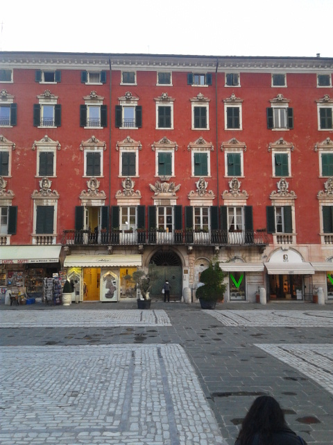 Palazzo del Medico a Carrara